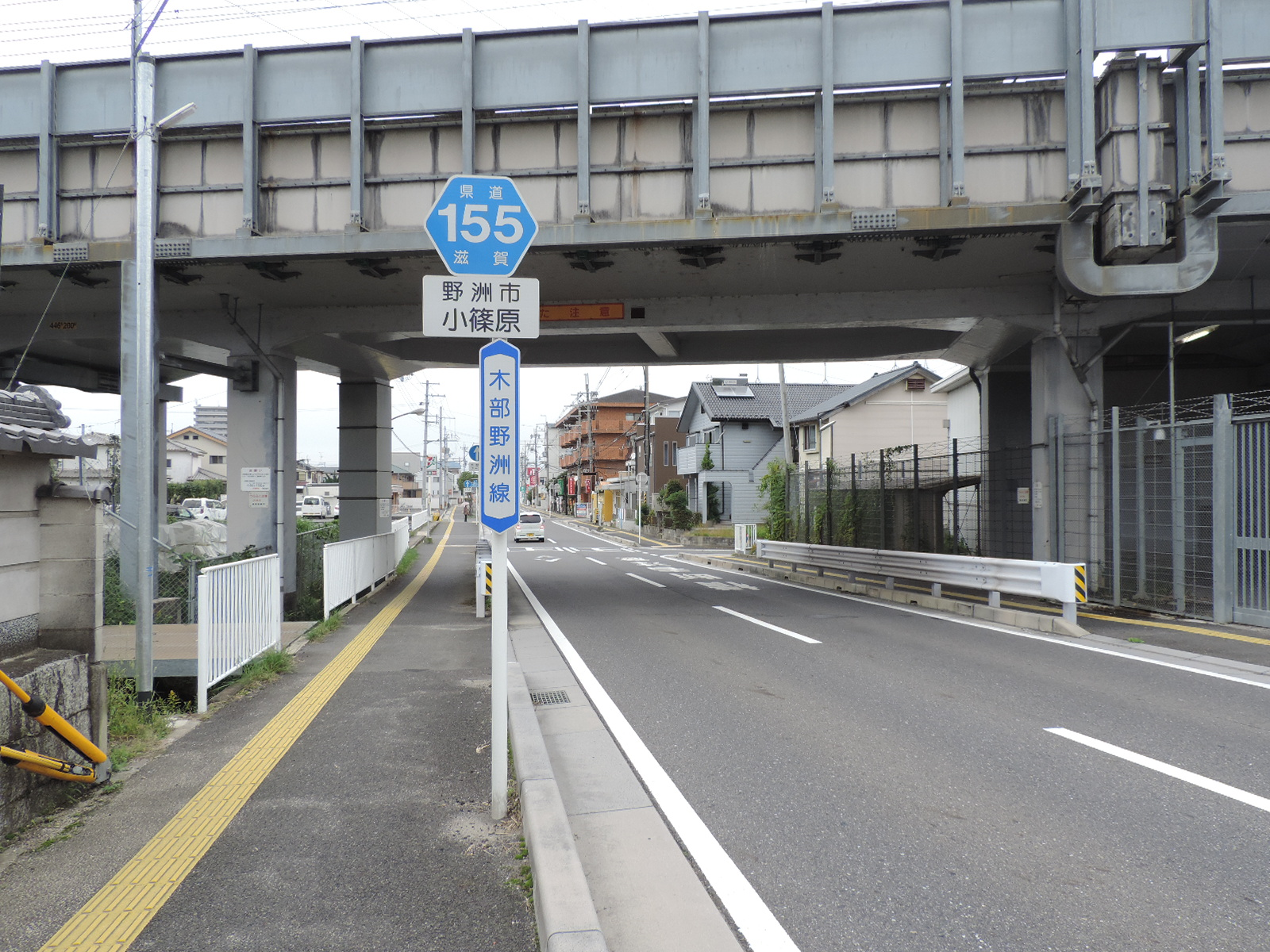 滋賀県道155号木部野洲線。野洲市小篠原にて。2017年撮影。